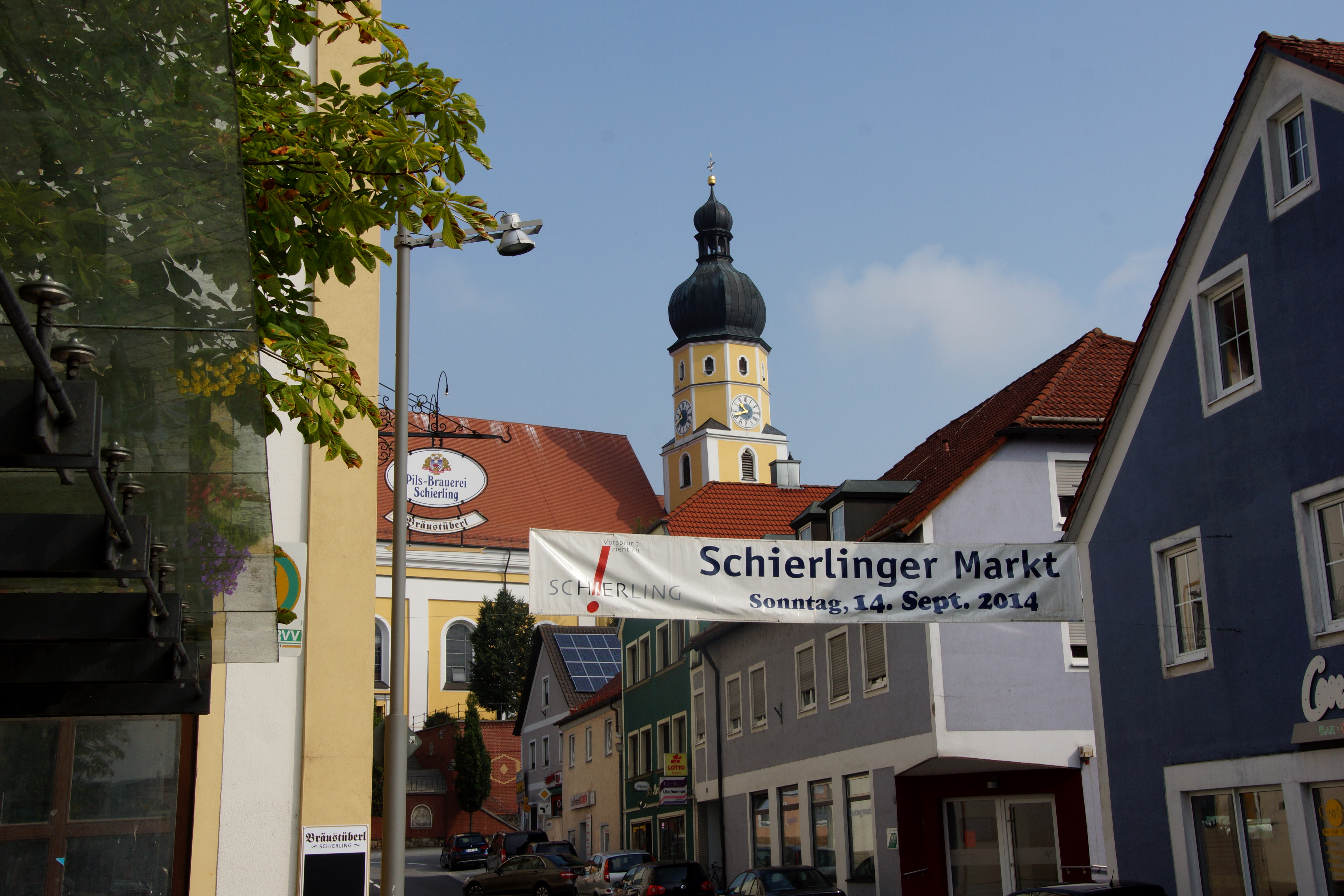 Markt Schierling im Landkreis Regensburg